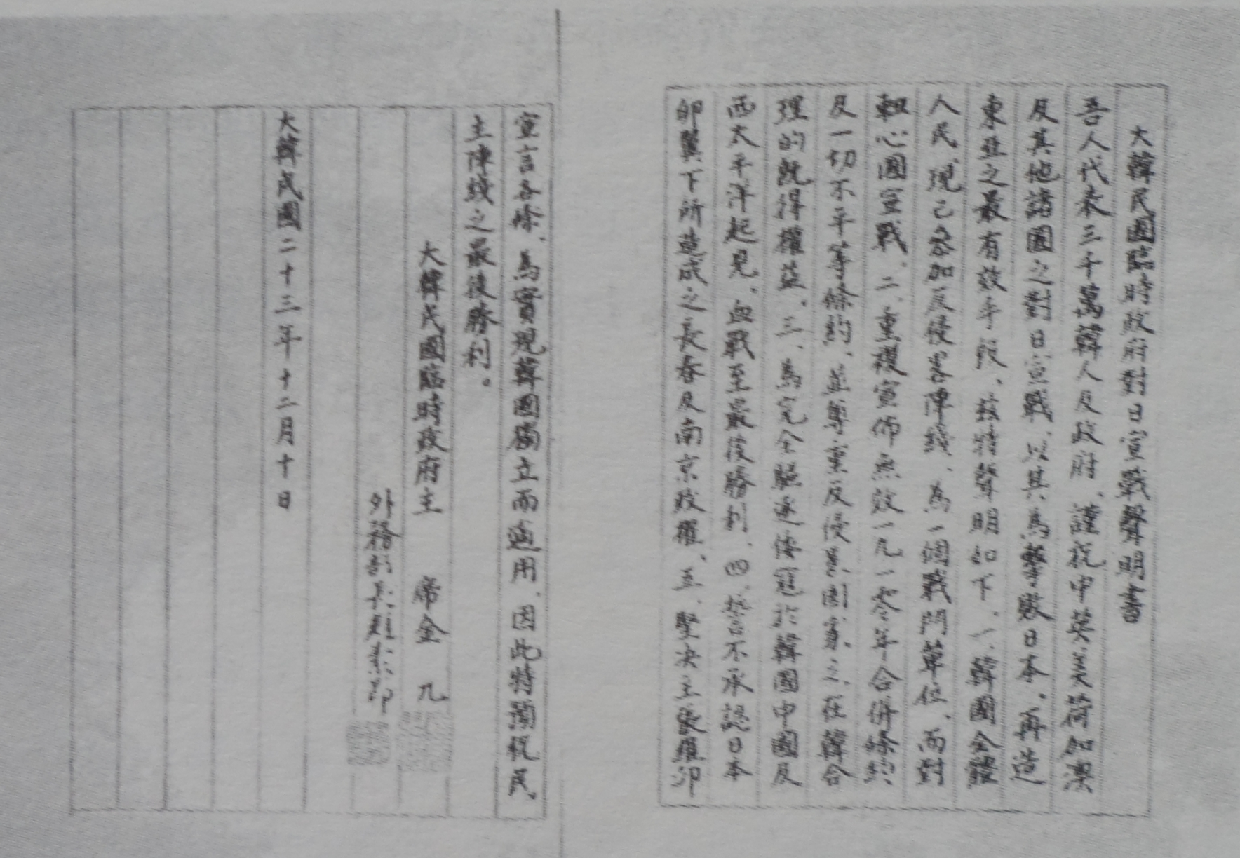 中文（中国大陆）: 大韩民国临时政府对日宣战书